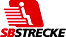 Logo der Personenverkehrs AG der Österreichischen Bundesbahnen für Selbstbedienungsstrecken